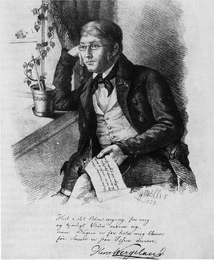 A.Møllers portrett av Henrik Wergeland med hund fra 1839 med Wergelands påtegning under.